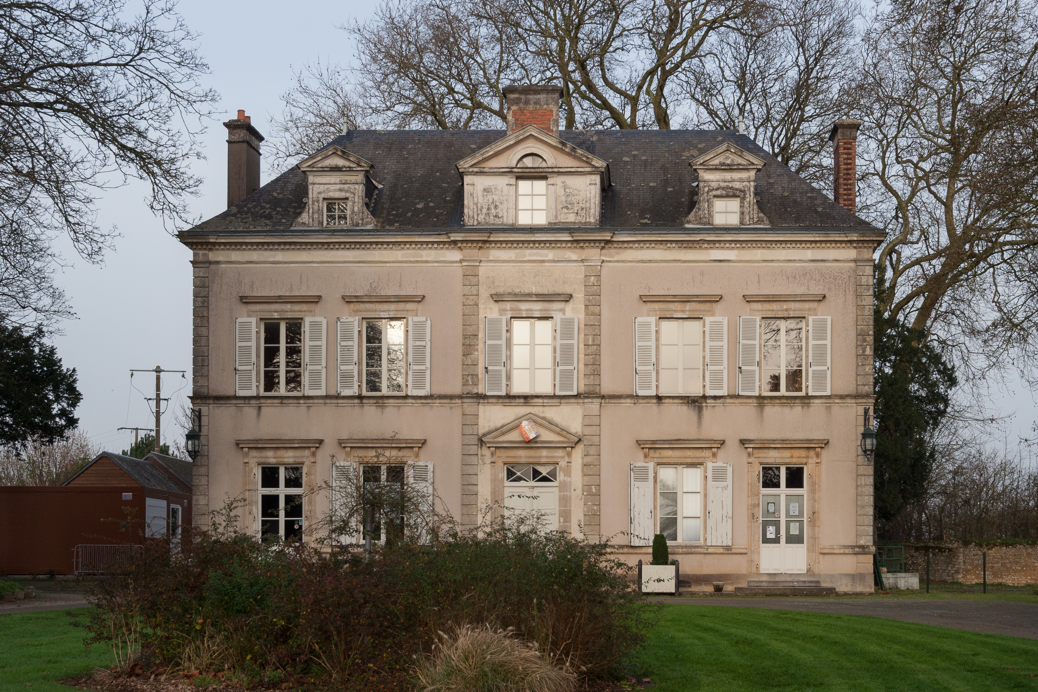 Mairie de Ruillé-en-Champagne.